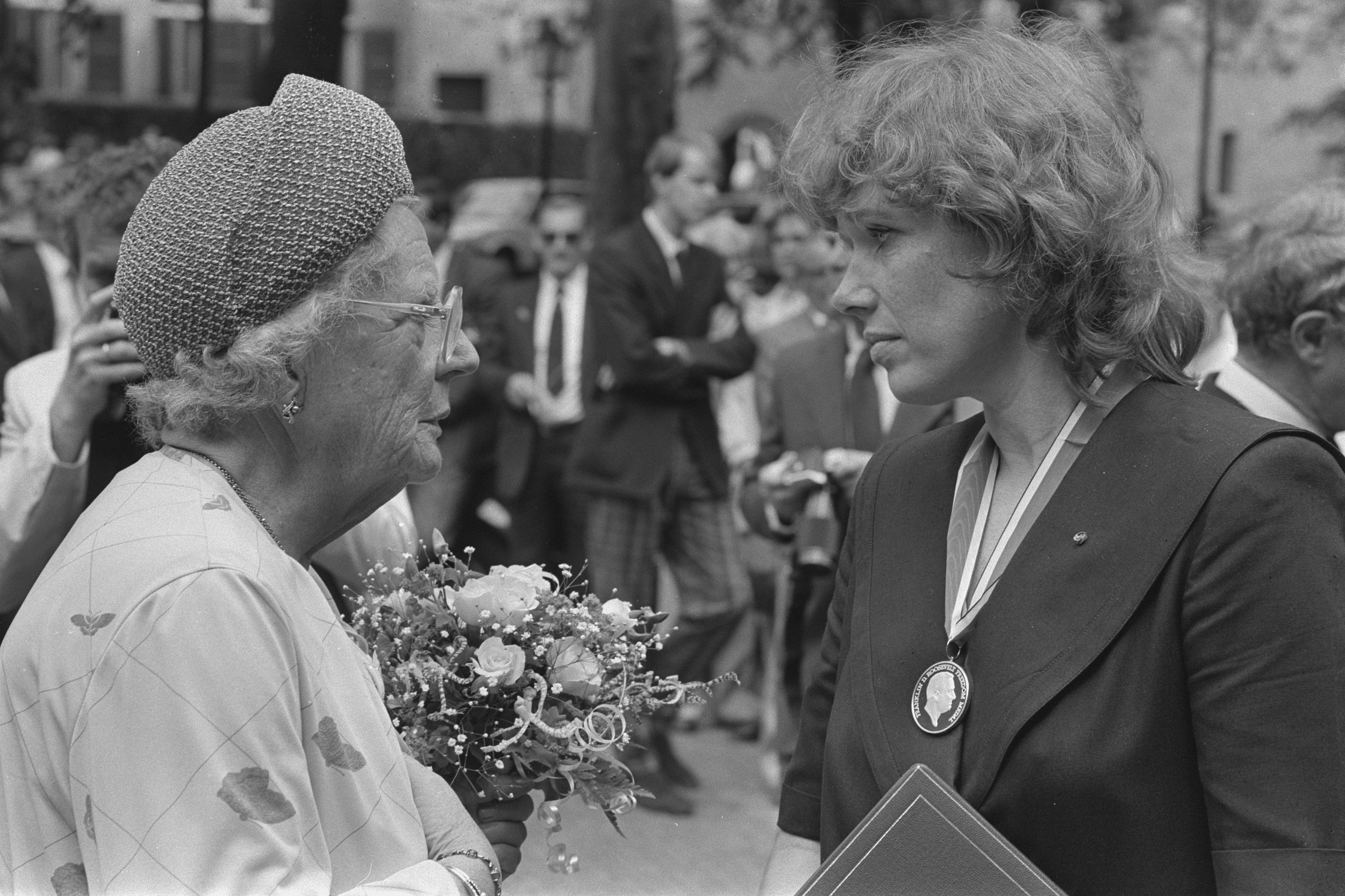 Collectie / Archief : Fotocollectie Anefo Reportage / Serie : [ onbekend ] Beschrijving : Prinses Juliana bij uitreiking Four Freedoms Awards in Middelburg; Prinses Juliana en Liv Ullman Datum : 23 juni 1984 Locatie : Middelburg, Zeeland Trefwoorden : actrices, filmsterren, koninklijk huis, prijsuitreikingen Persoonsnaam : Juliana, prinses, Ullman, Liv Fotograaf : Croes, Rob C. / Anefo Auteursrechthebbende : Nationaal Archief Materiaalsoort : Negatief (zwart/wit) Nummer archiefinventaris : bekijk toegang 2.24.01.05 Bestanddeelnummer : 933-0122